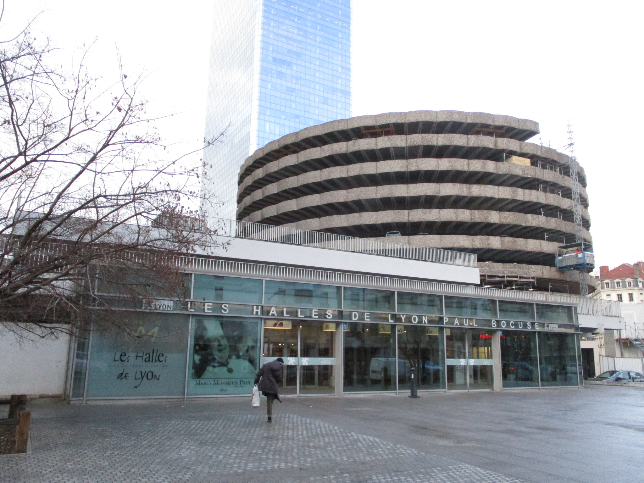 Halles de Lyon-Paul Bocuse